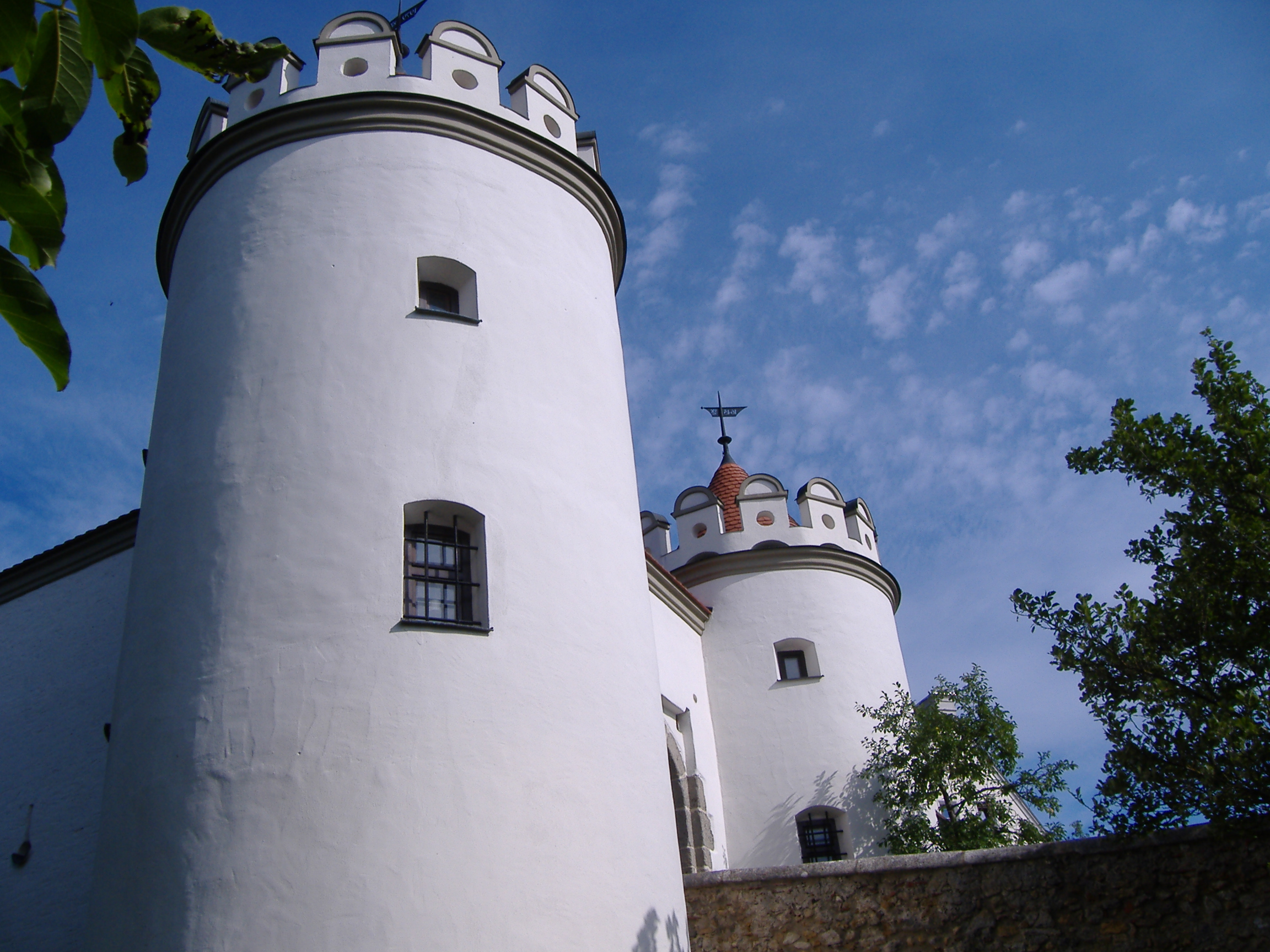 Schloss Alerheim